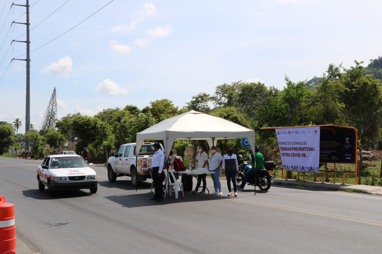 Filtro sanitario en entrada de Poza Rica